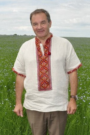 Мішель Терещенко на тлі поля льону, 2014